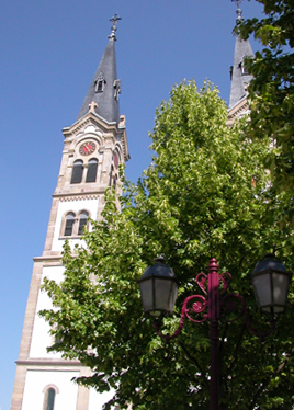 Saint-Symphorien d'Illkirch (église) Auteur: Quedza Date: 23.6.2006 (cliché et redimension)